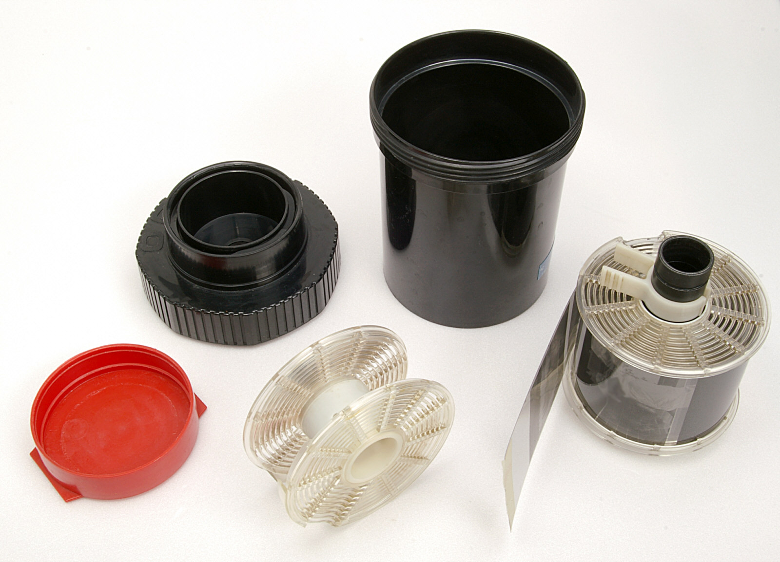 Entwicklungsdose für die Kippentwicklung von Rollfilmen Typ 127, 120 und 220 sowie von Kleinbildfilmen 135. Verstellbare Spiraleinsätze, Schraubdeckel mit Einfüllöffnung und Lichtfalle, Stülpdeckel. System Jobo 1000, hier für maximal zwei Filme 135 oder einen Rollfilm. Neben dieser Dose für ca. 500ml Chemie waren noch eine kleinere Variante mit ca. 260ml für nur einen Film 135 sowie eine größere für maximal fünf 135er verfügbar.